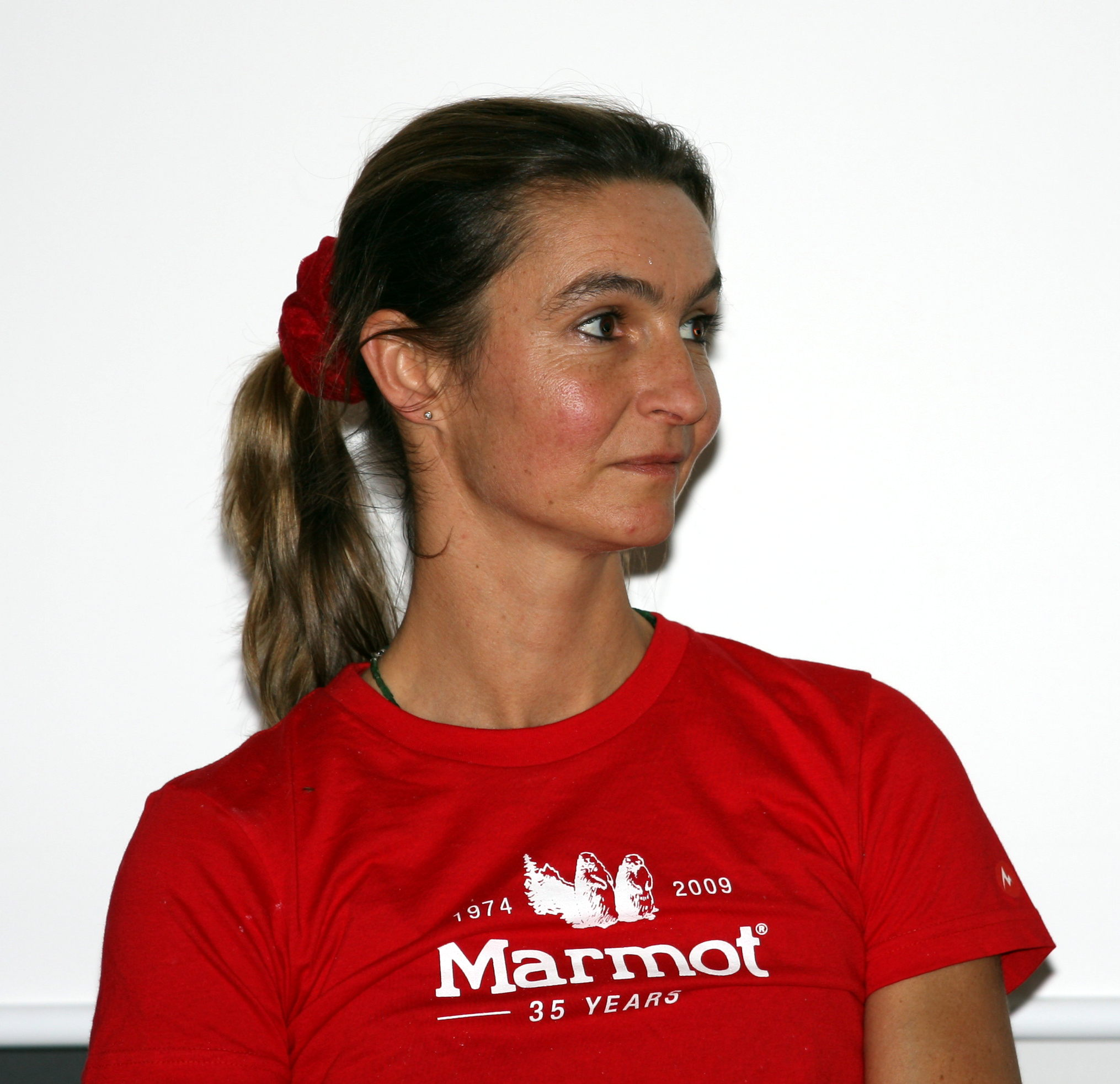 Marietta Uhden bei der Veranstaltung Challenge The Wall im Kletterzentrum Gilching